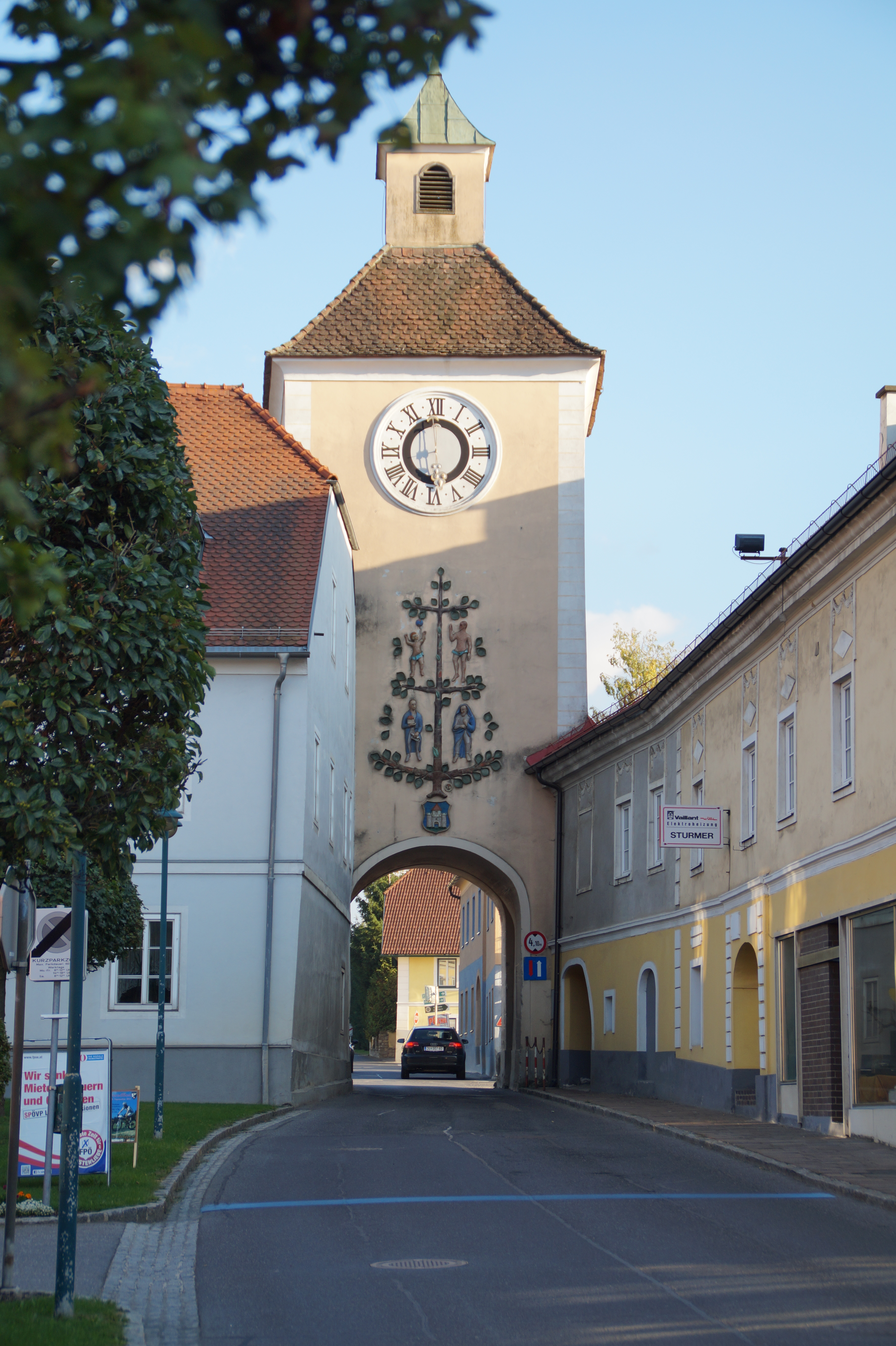 Torturm am südlichen Ende des Hauptplatzes, Obdach, Bezirk Murtal